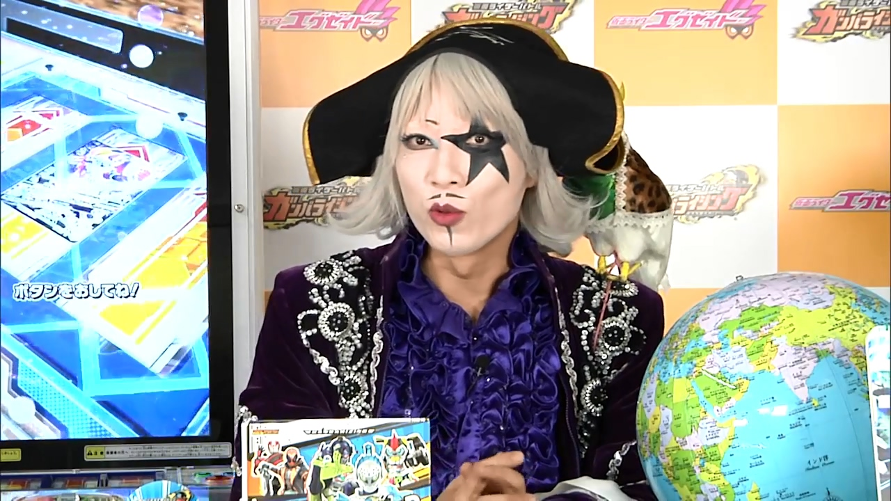 データカードダス 仮面ライダーガンバライジング ガシャットヘンシン 大はっぴょうかい